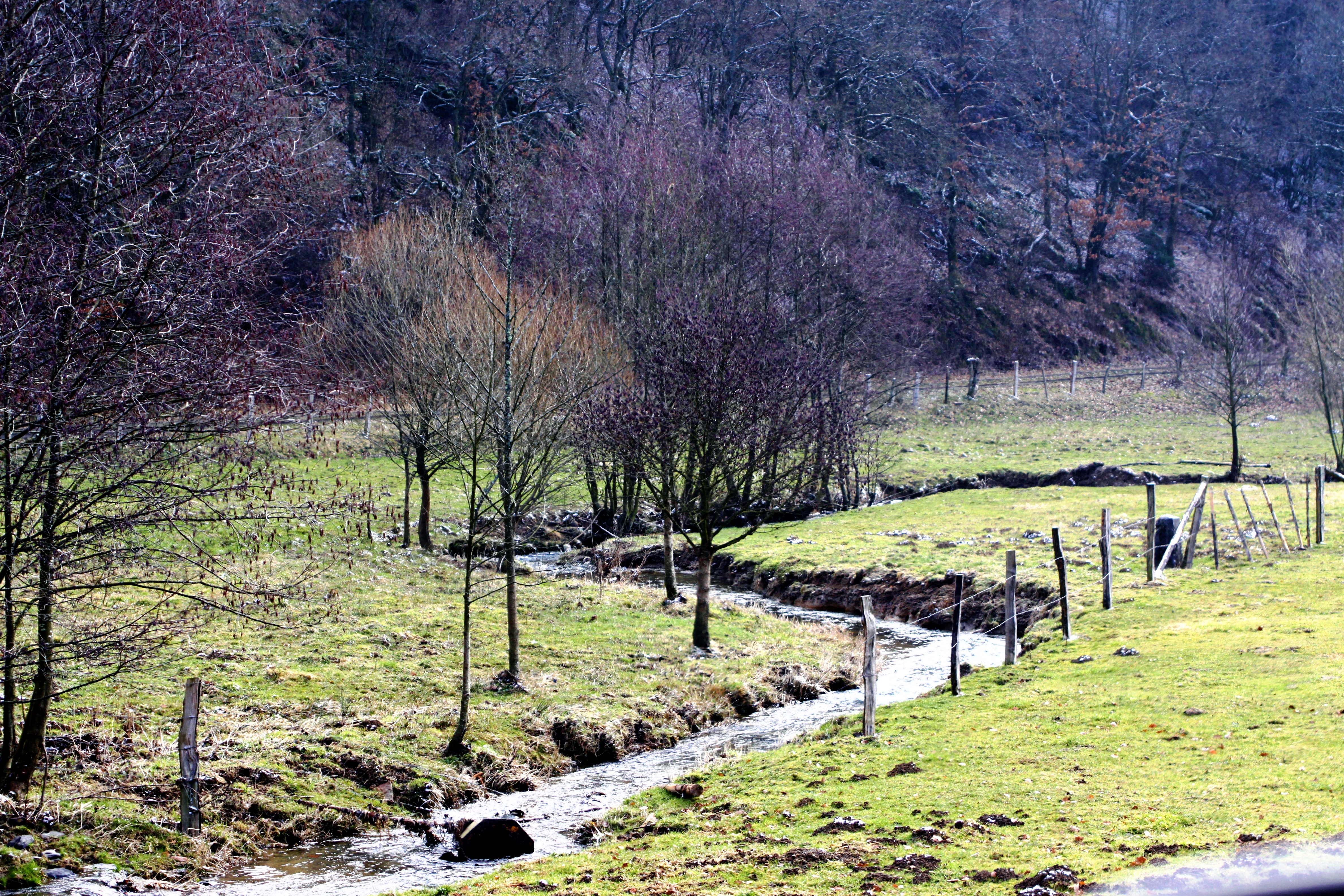 D'Bëtlerbaach op der belsch-lëtzebuergescher Grenz